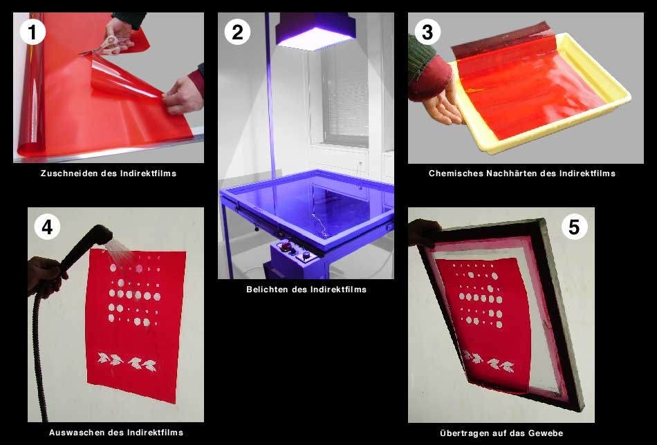 Indirekte Siebdruckschablone